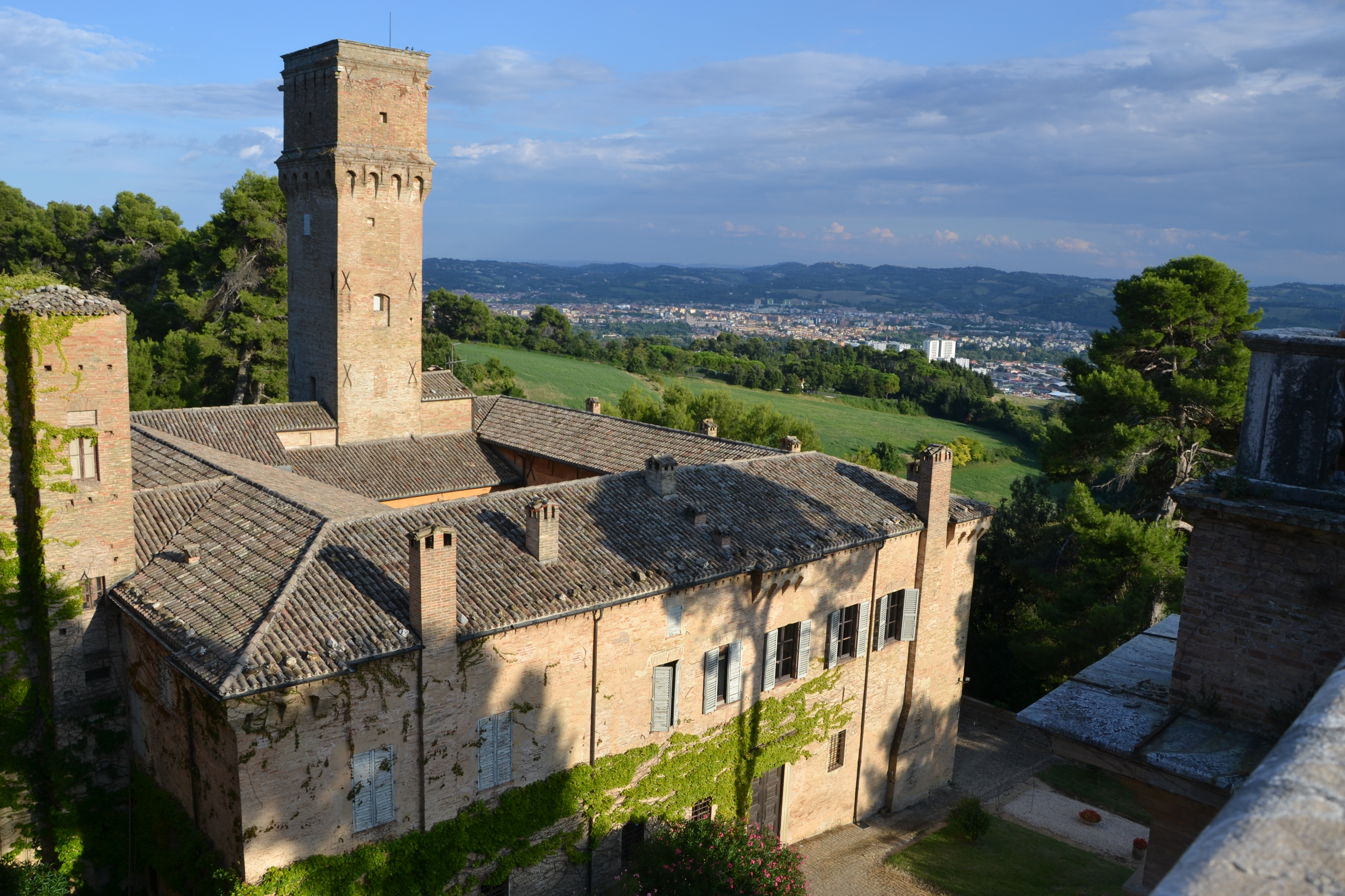 Ala costruita poco dopo la metà del XV secolo per volere di Alessandro Sforza